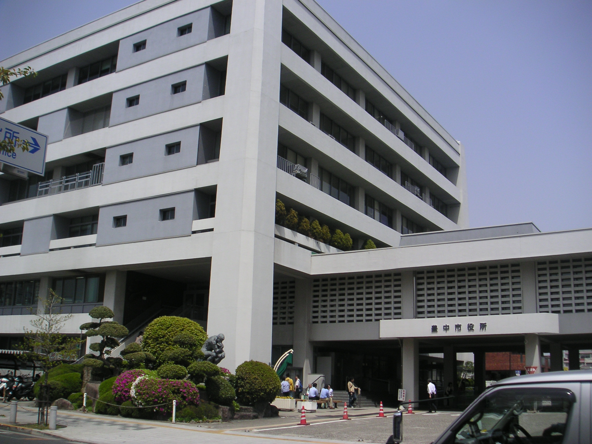 Toyonaka City Hall in Osaka-fu, Japan